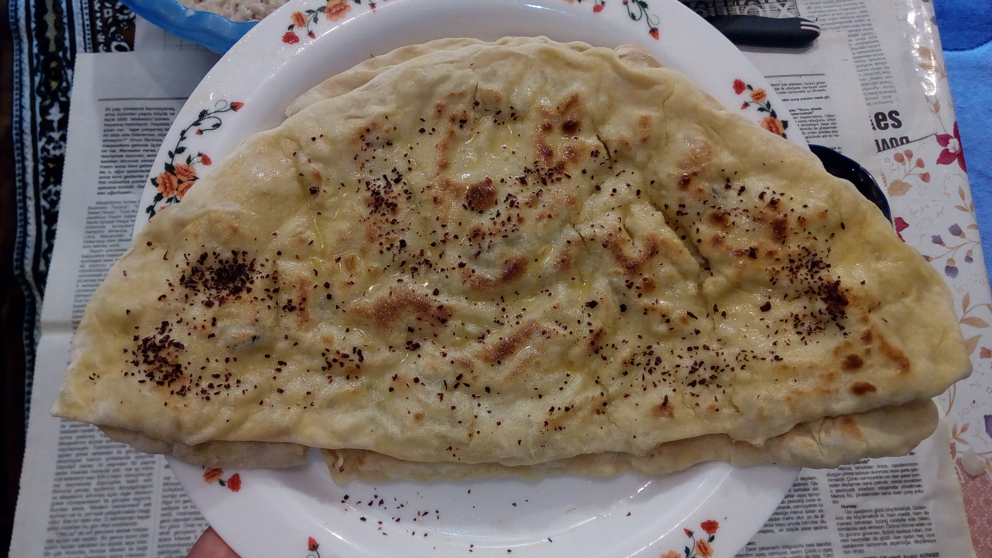 Qarın qutabı Daha ətrafı: bu videoda